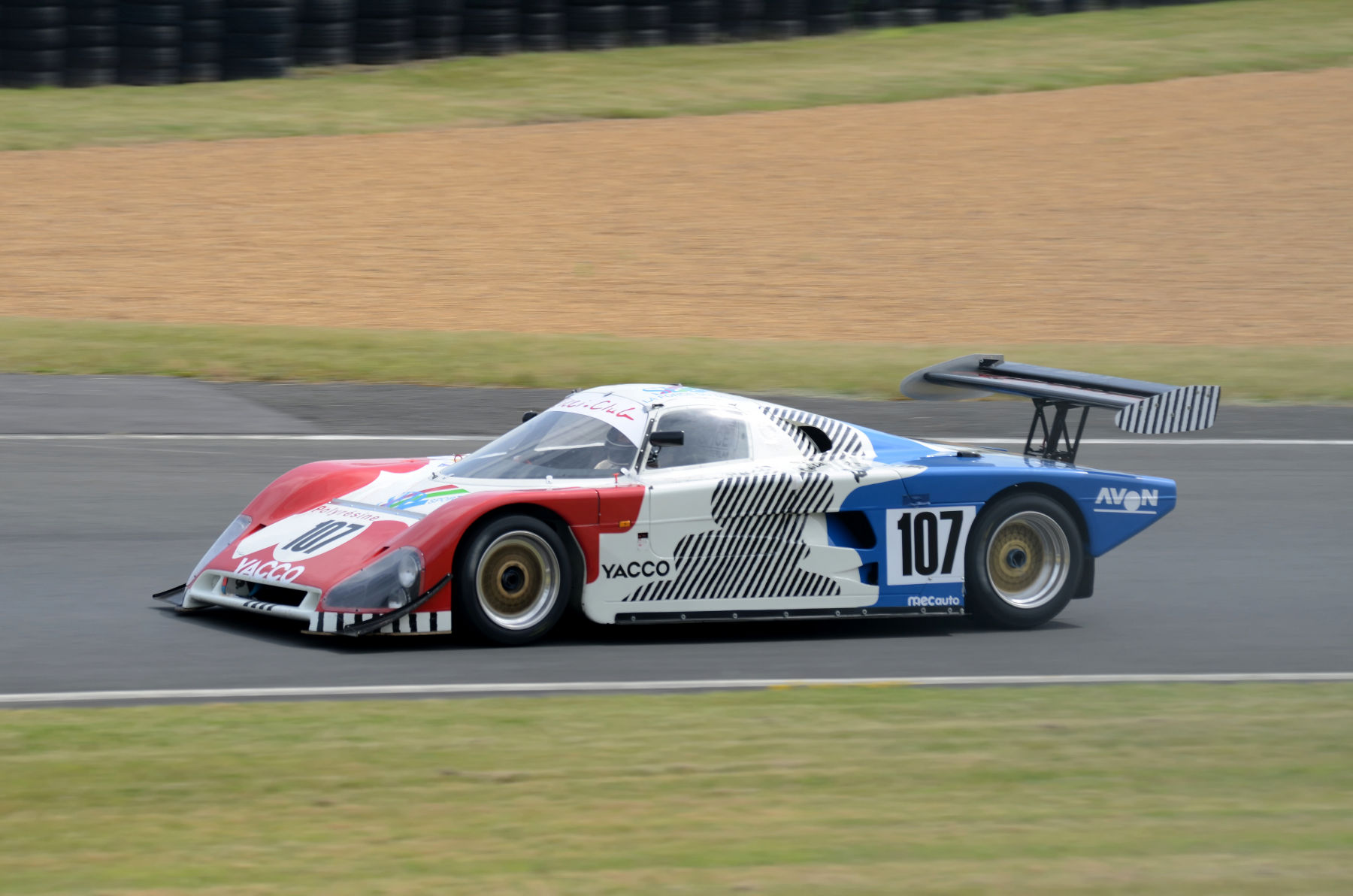 Spice SE88C - Ford de l'écurie Chamberlain Engineering ayant participée aux 24 Heures du Mans 1988 avec comme pilote Claude Ballot-Léna, Jean-Louis Ricci et Jean-Claude Andruet